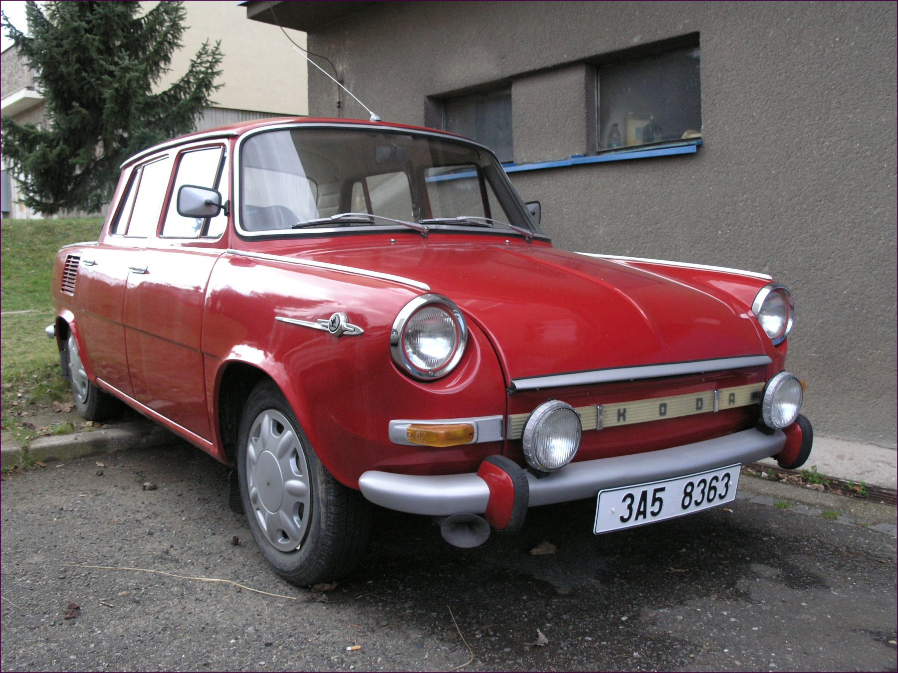 Škoda 1100 MB